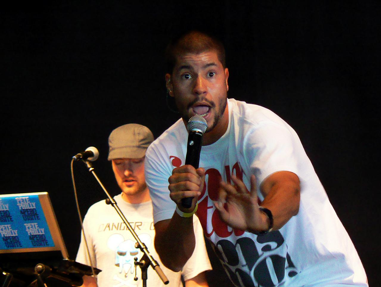 Festival deBeschaving in Utrecht op 30 augustus 2008